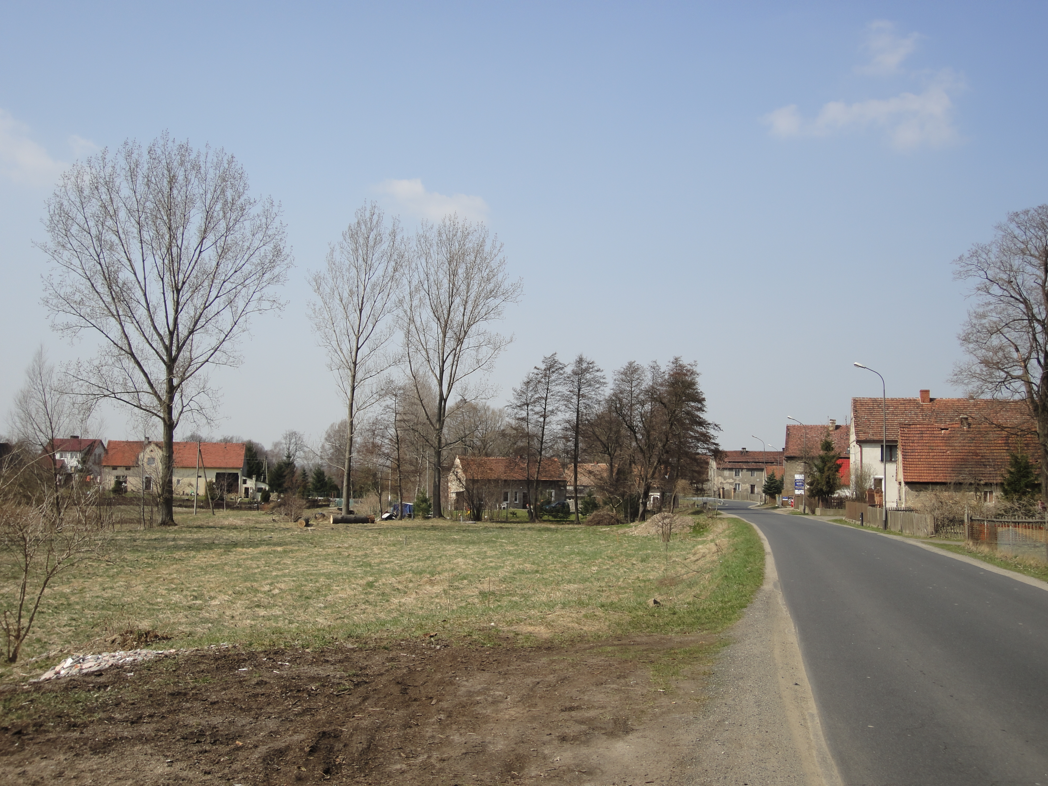 Żarki Średnie - widok wsi